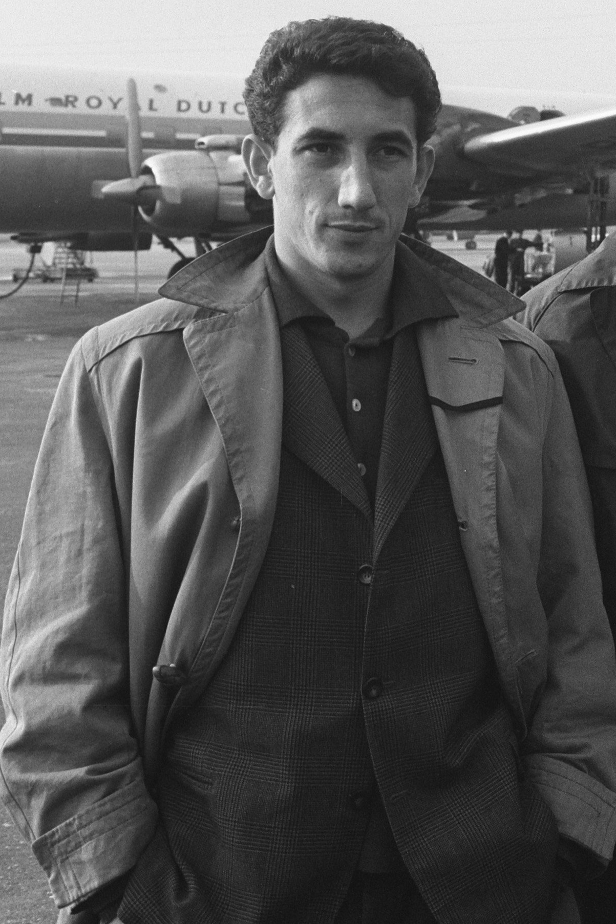 János Göröcs met het Hongaarse elftal in 1961